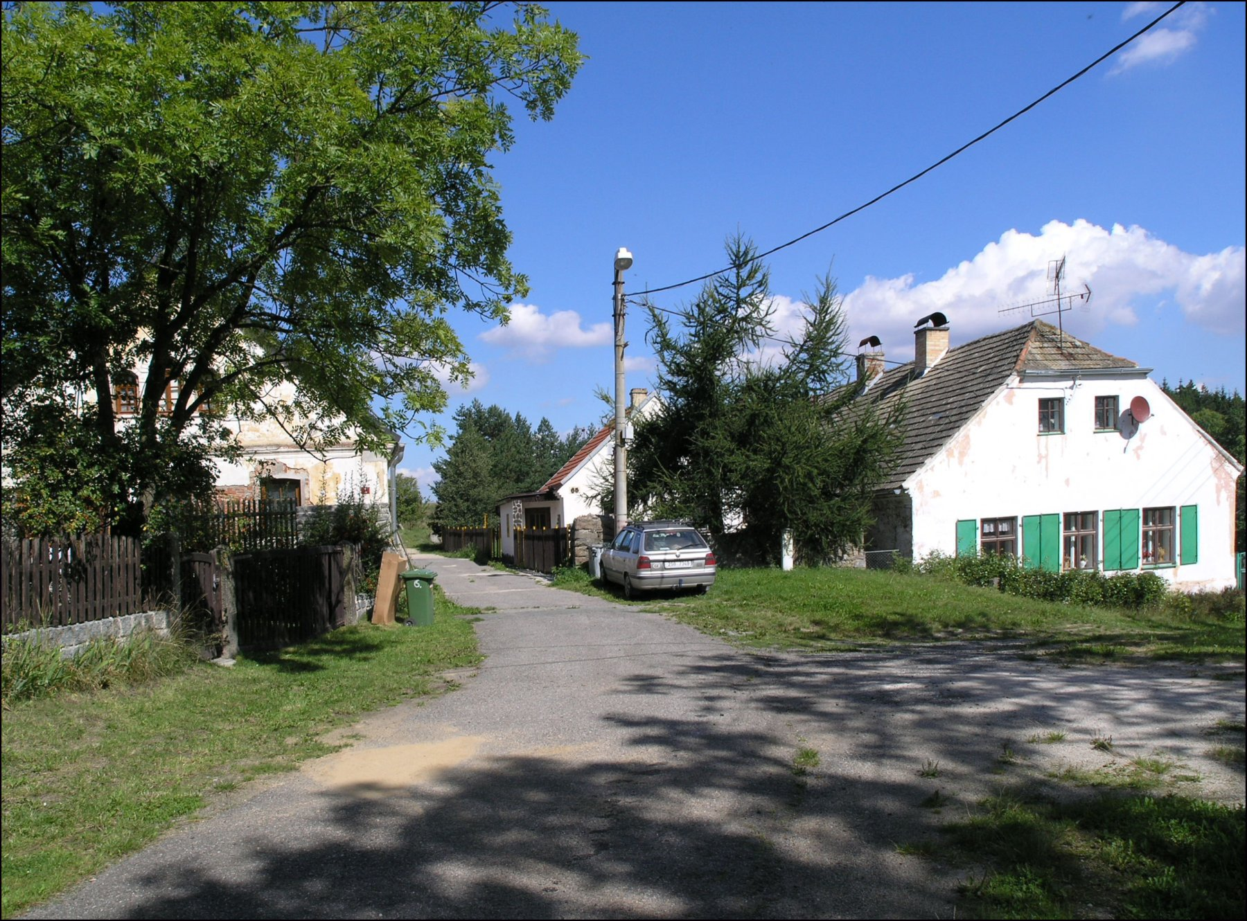 Tis u Blatna (okres Plzeň-Sever)